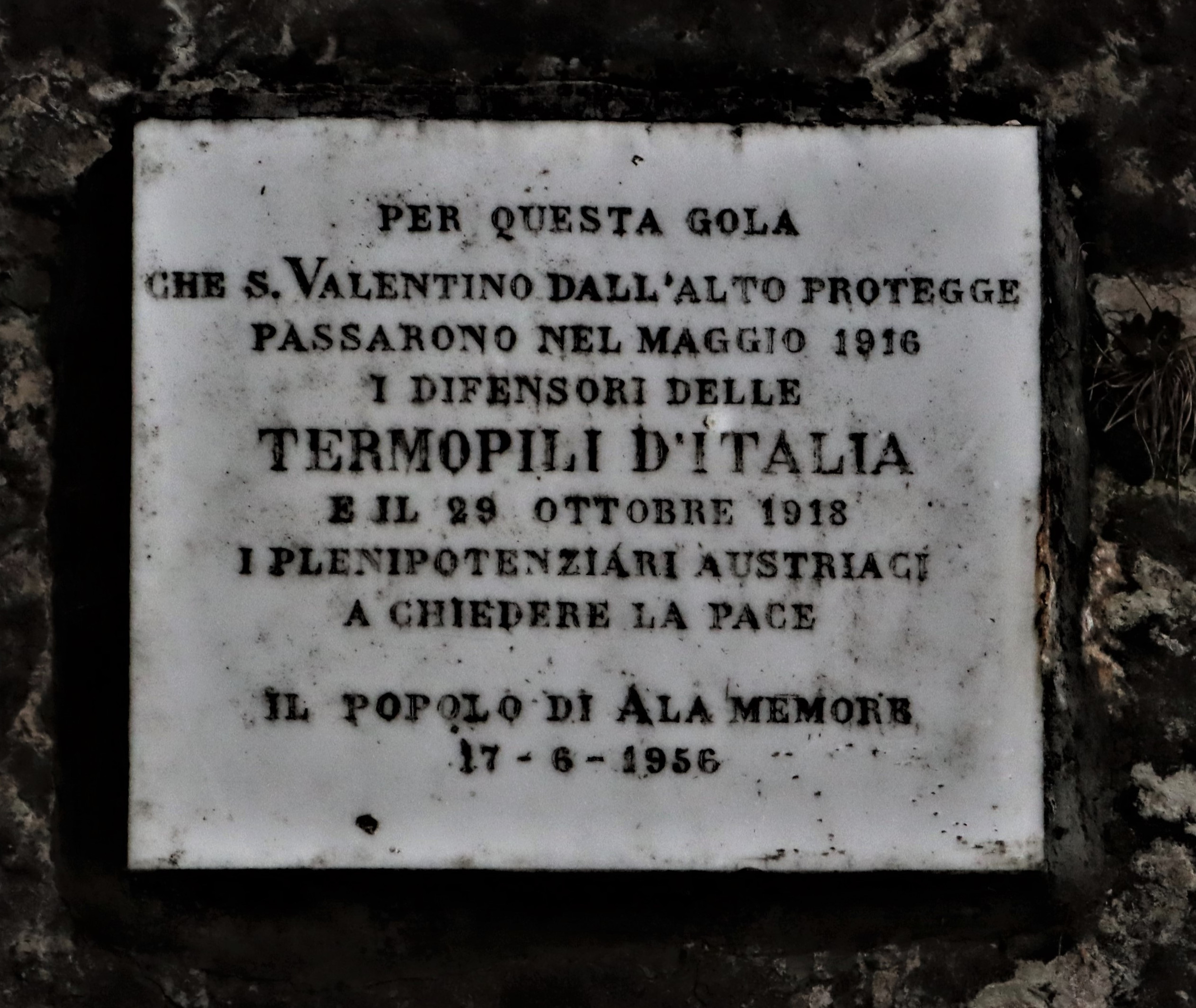 Lapide in marmo sulla salita nella gola che porta a San Valentino. Luogo definito TERMOPILI D'ITALIA